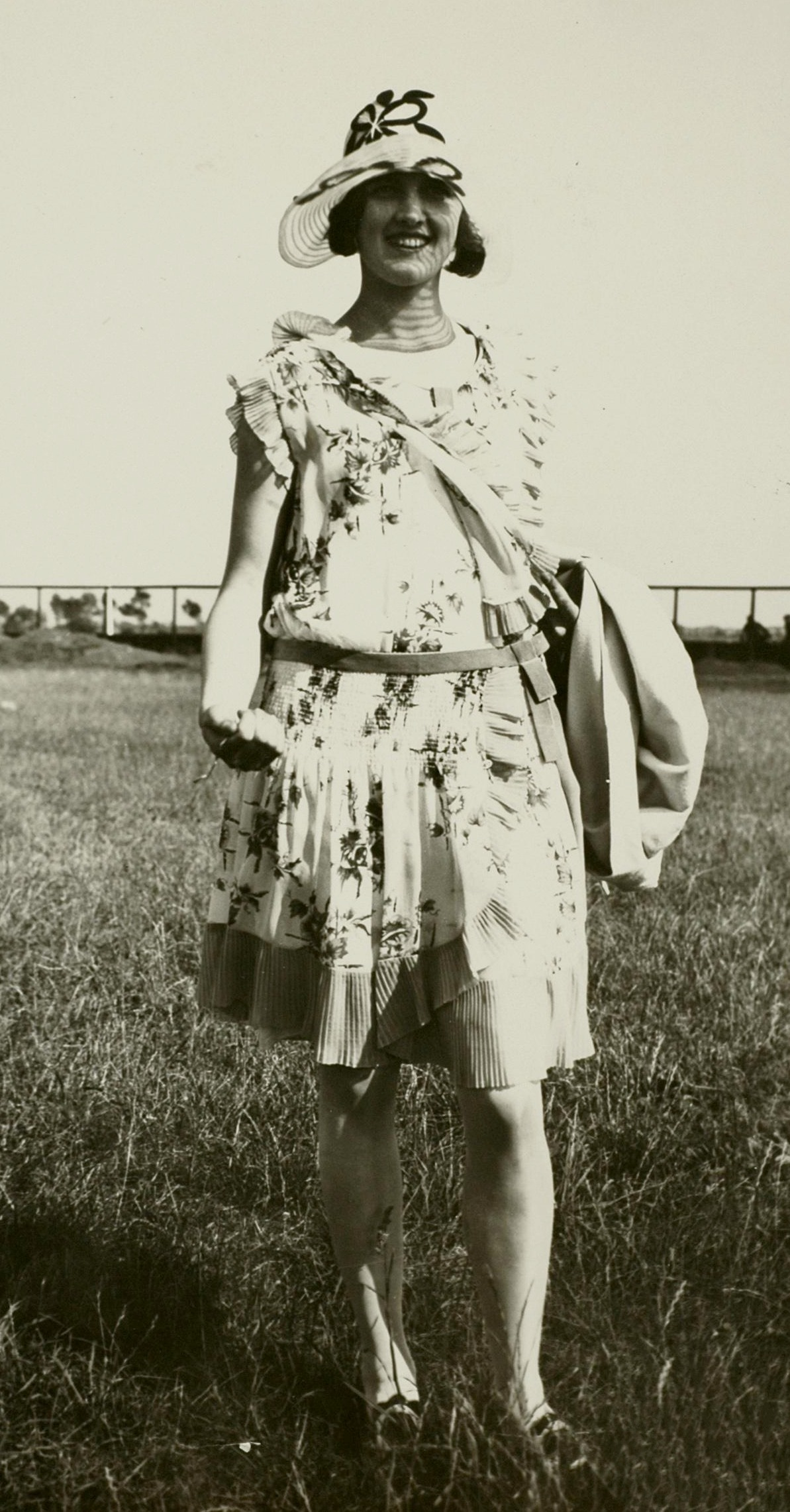 Sport. Sport, Olympische Spelen Amsterdam, 1928 : Olympisch kampioene hoogspringen Ethel Catherwood poseert in jurk en met hoed op.